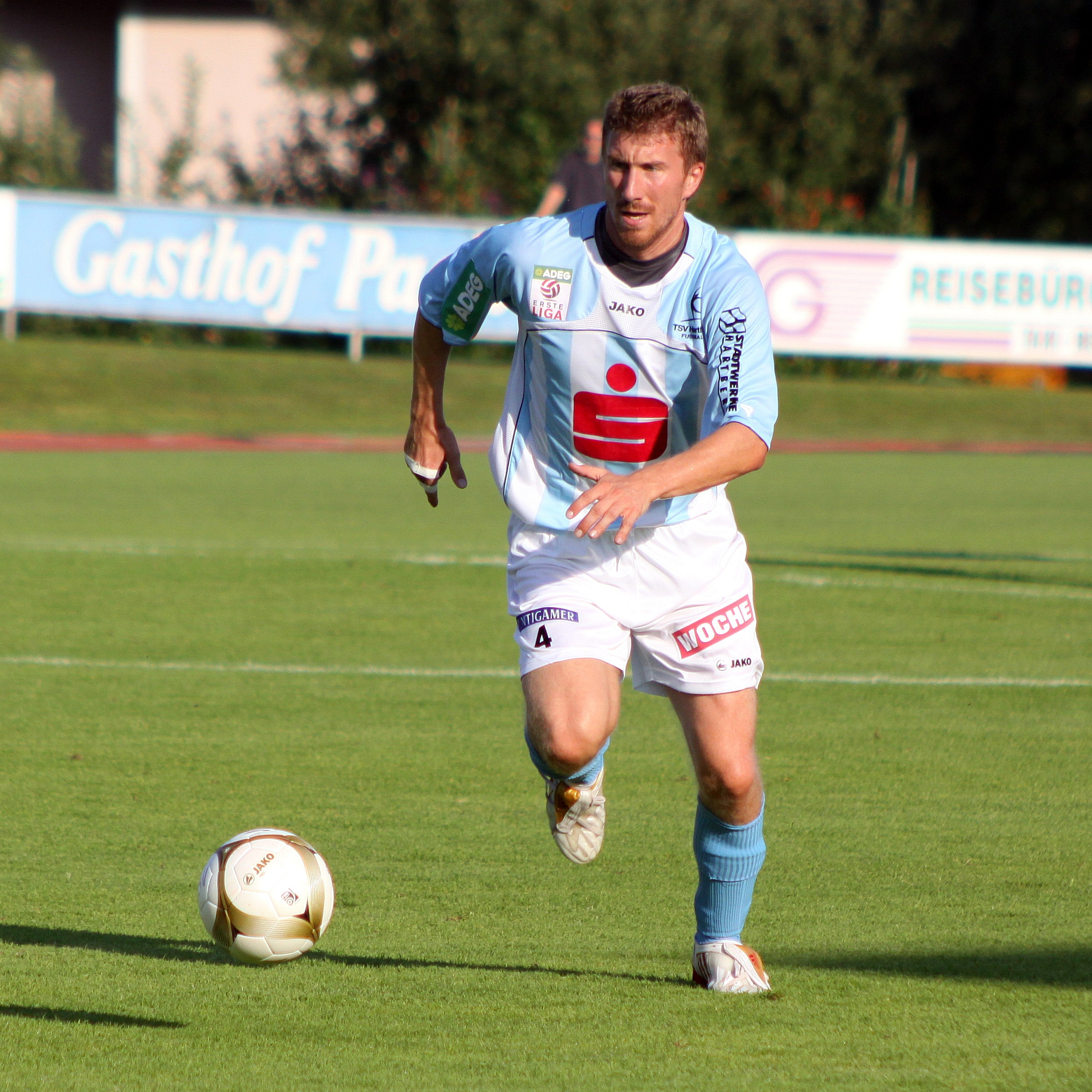 Tamas Somorjai - TSV Hartberg (3)